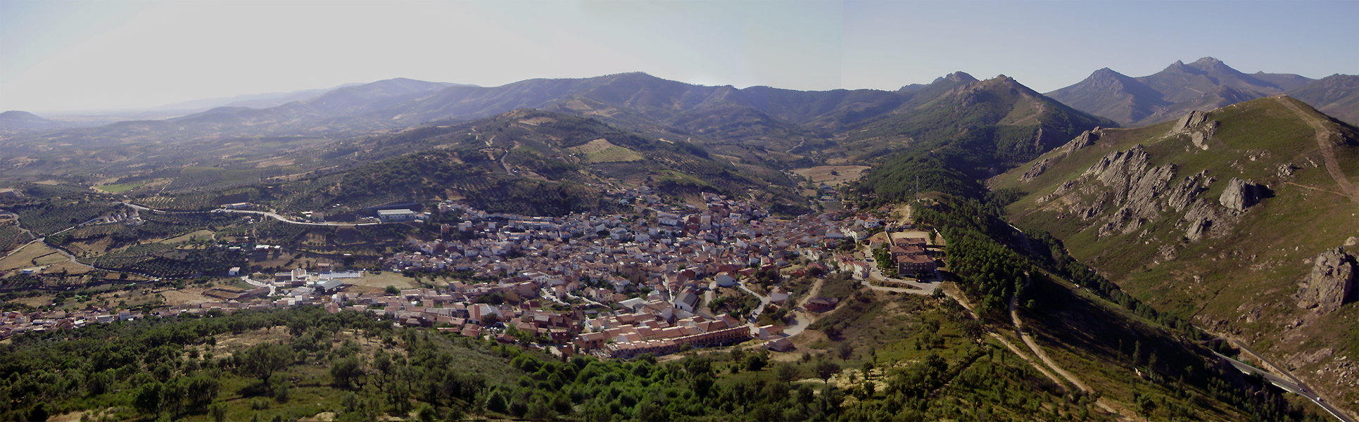 La localidad de Cañamero, en Cáceres (España), visto desde El Castillo.